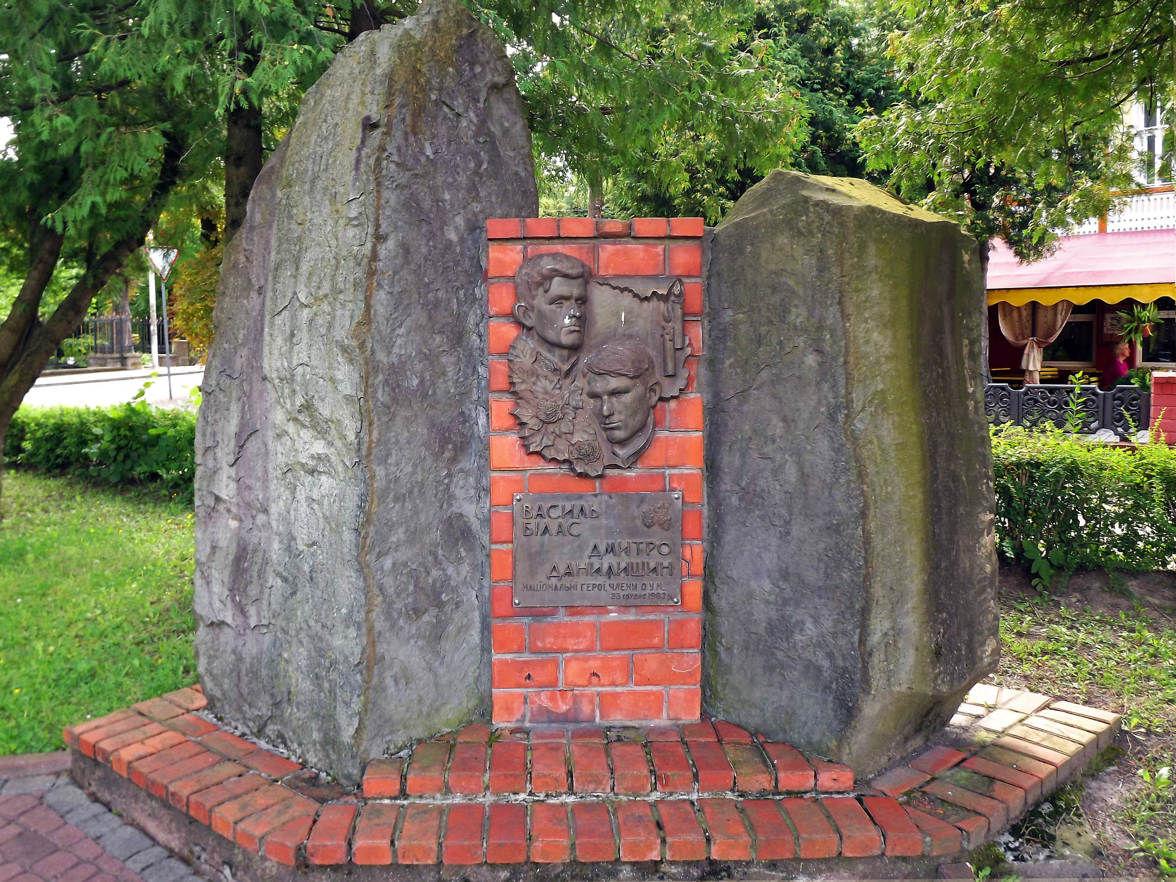 Пам'ятник Біласу В. і Данилишину Д. (ск. Б. Кравець, арх. М. Криницький, 1993, бронза), Трускавець, вул. Шевченка, 38